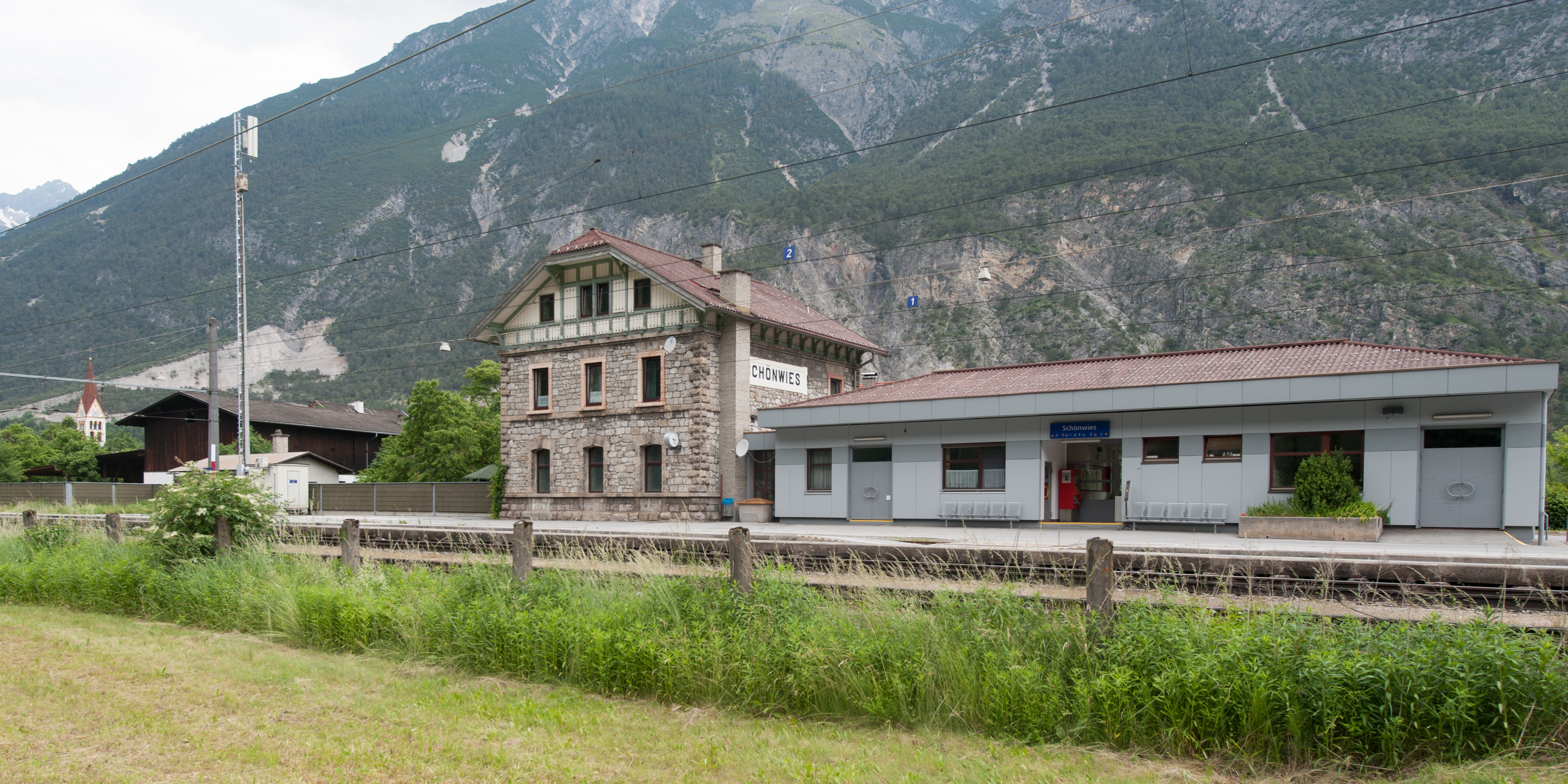 Wiki takes Nordtiroler Oberland: Bahnhof Schönwies This media shows the remarkable cultural object in the Austrian state of Tyrol listed by the Tyrolean Art Cadastre with the ID 23460. (on tirisMaps, on tirisdienste.at, pdf, more images on Commons)